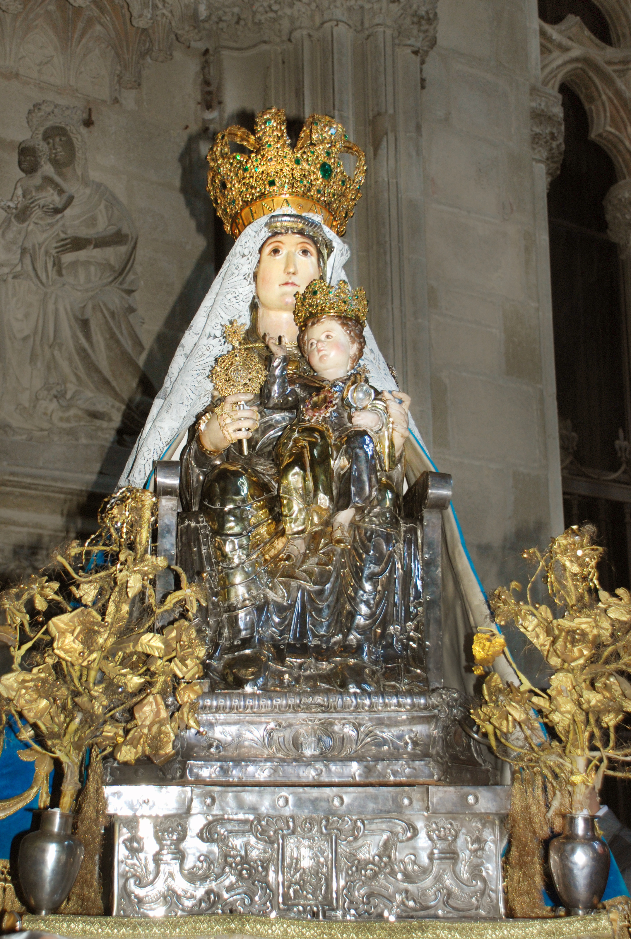 Virgen Santa María la Real de Pamplona el día de la Asunción (15 de agosto) en procesión por el claustro de la catedral pamplonesa de la que es titular.